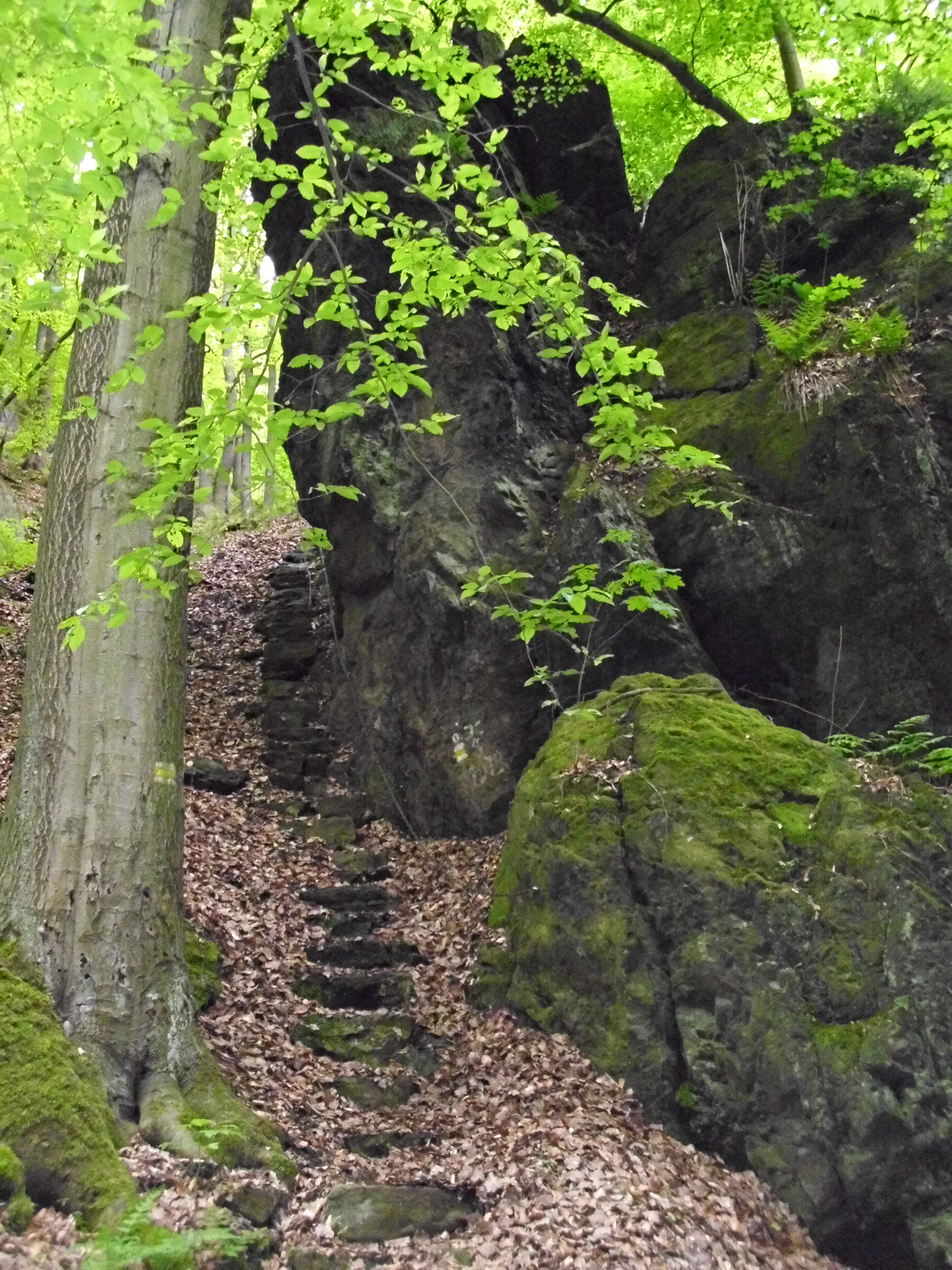 Diese bietet einen Guten Aufstieg im Rabenauer Grund mit Ausblick nach Freital Coßmannsdorf